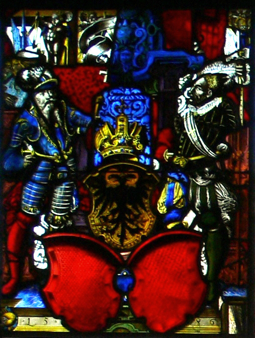 Schaffhausen, Museum zu Allerheiligen